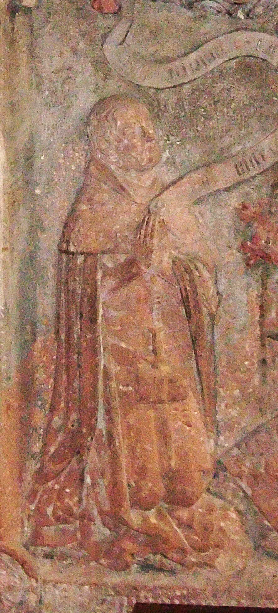 Frankfurt, Alte St. Nikolaikirche, Detail vom Epitaph für Siegfried zum Paradies (+ 1386), Bürgermeister von Frankfurt